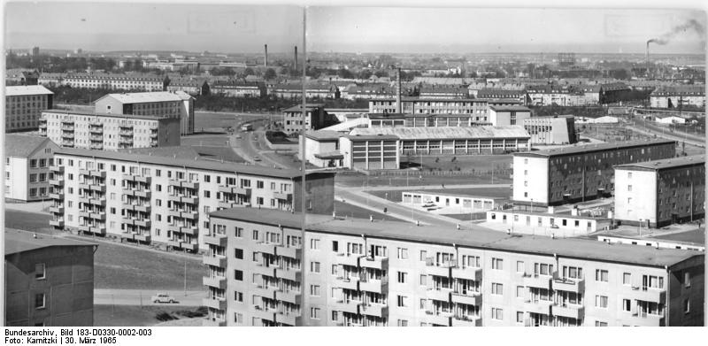 Rostock, Südstadt, Wohnblocks Zentralbild Karnitzki-30.3.1965 Pr-Der neue Stadtteil Rostock-Südstadt, der bereits fertiggestellt wurde. Trotz schlechter Witterungsverhältnissen wurde die vom VEB Wohnungsbaukombinat Rostock Anfang des Jahres eingeführte 50-Tage-Technologie in der Rostocker Südstadt eingehalten.